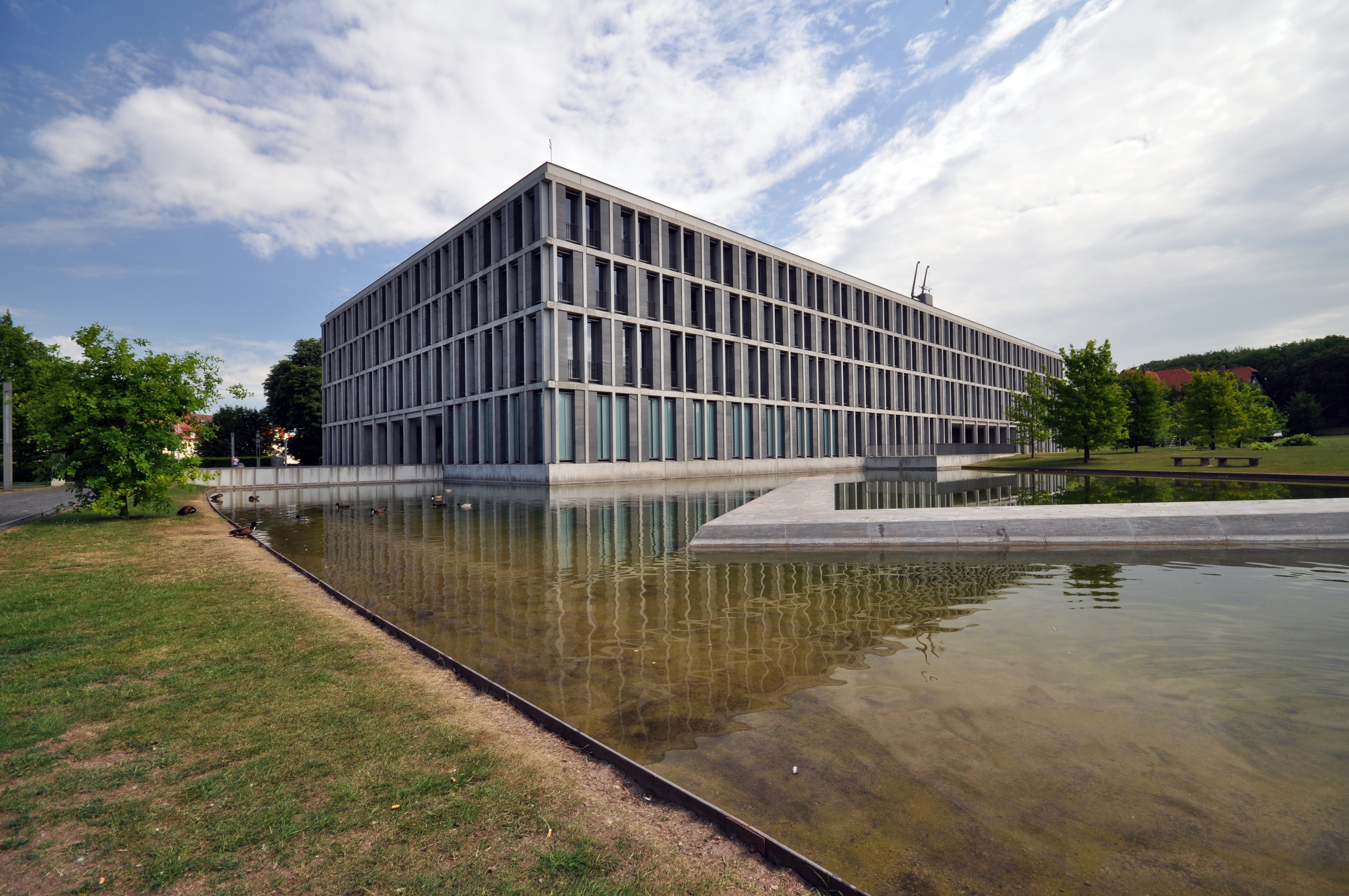 Bundesarbeitsgericht Erfurt